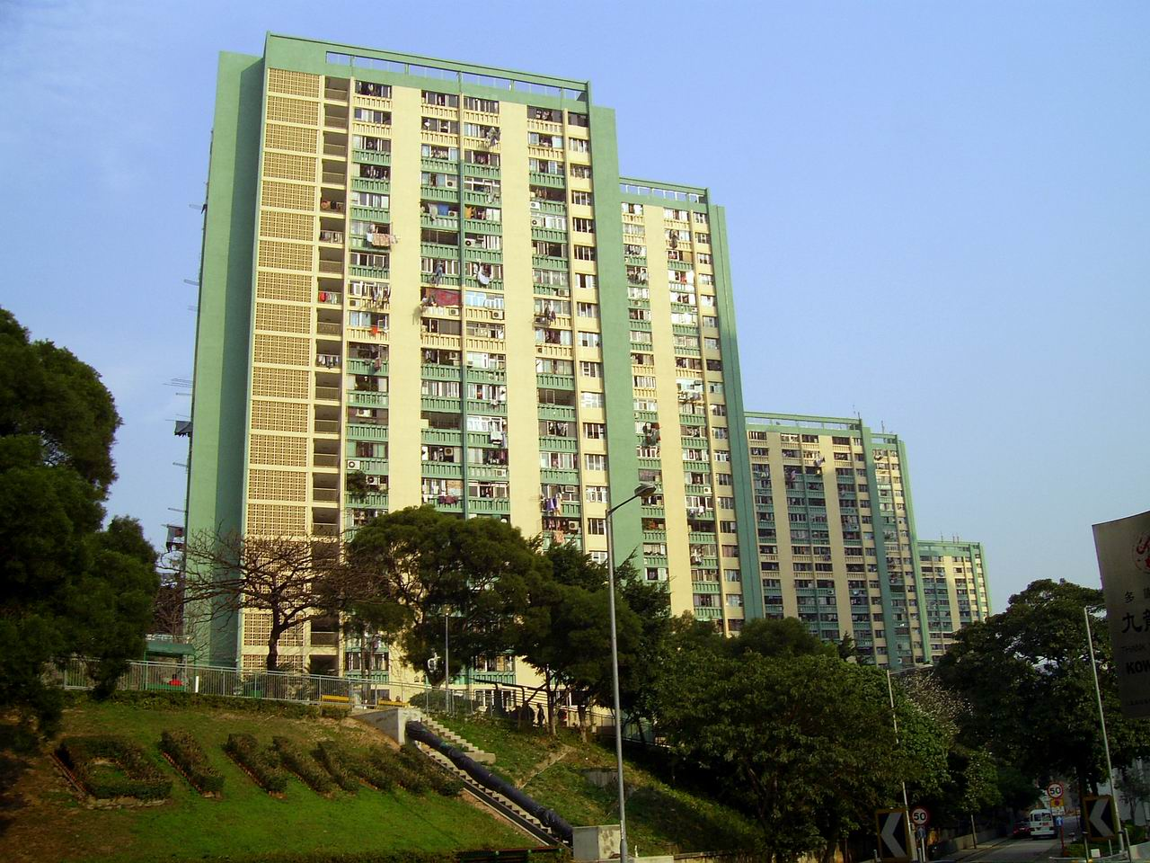 愛民邨